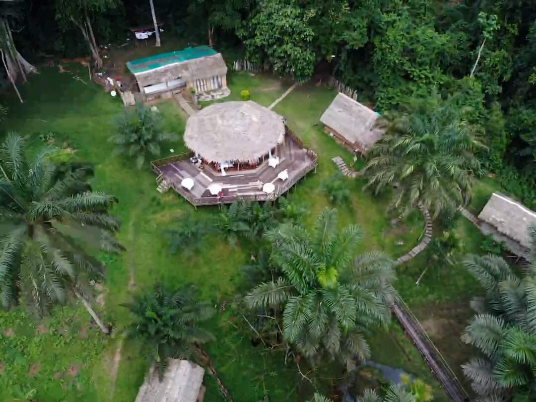 Lodge panorama forêt Oveng, Sud